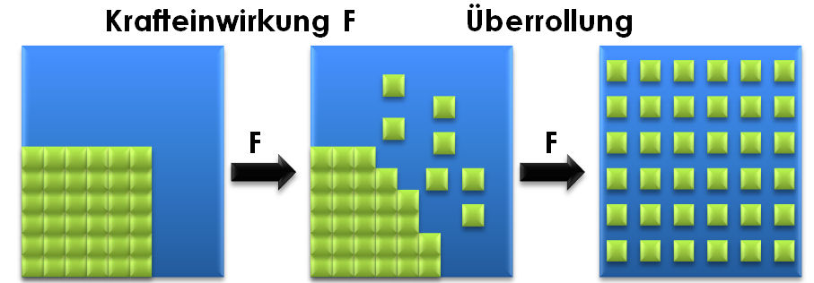 Schema Distributives Mischen